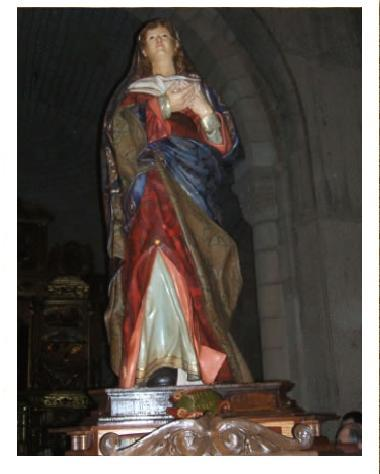 VIRGEN DE LA ALEGRIA DE SORIA, OBRA DE ANTONIO TAPIA.